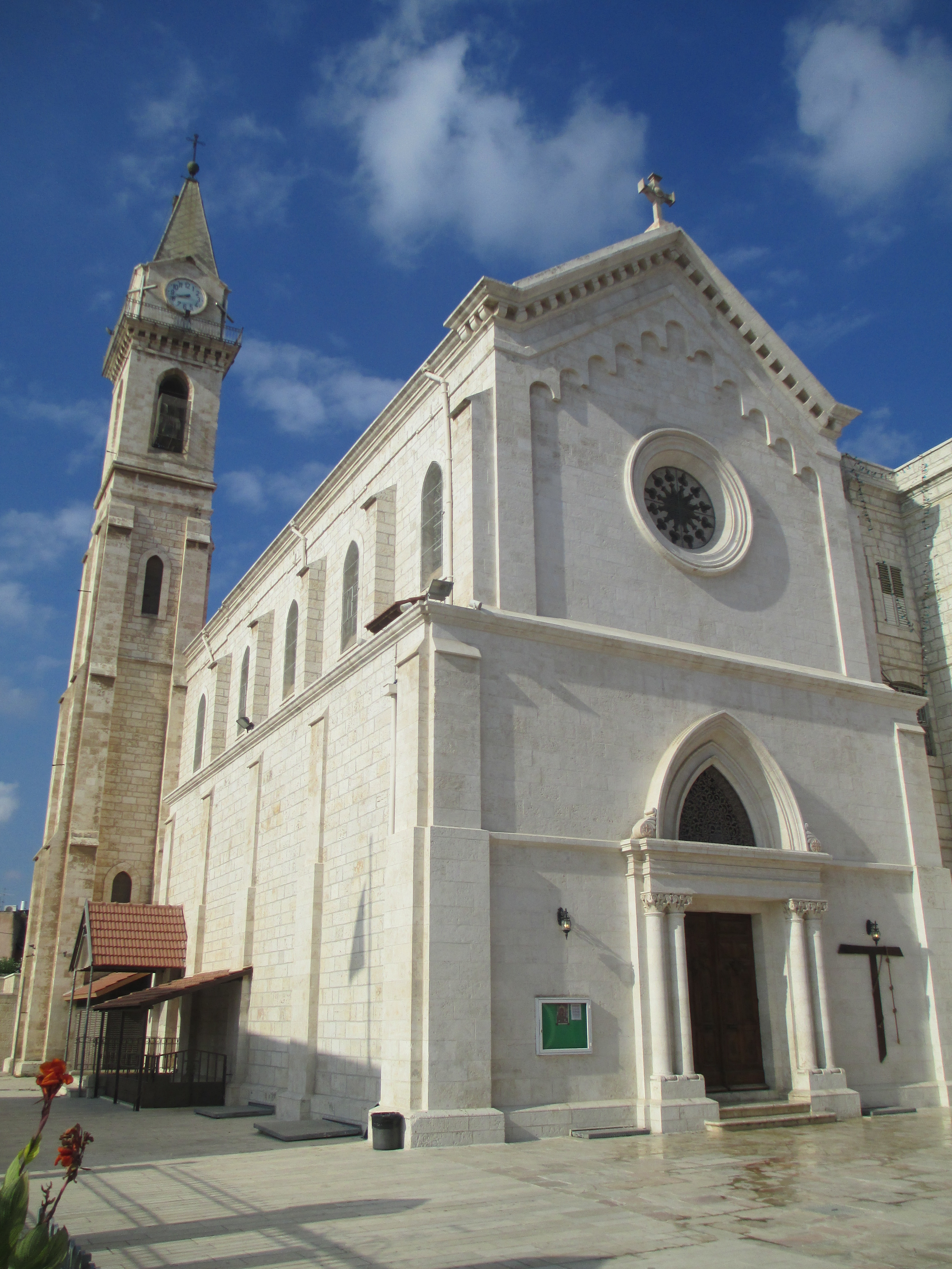 הכנסייה הפרנציסקנית ברמלה